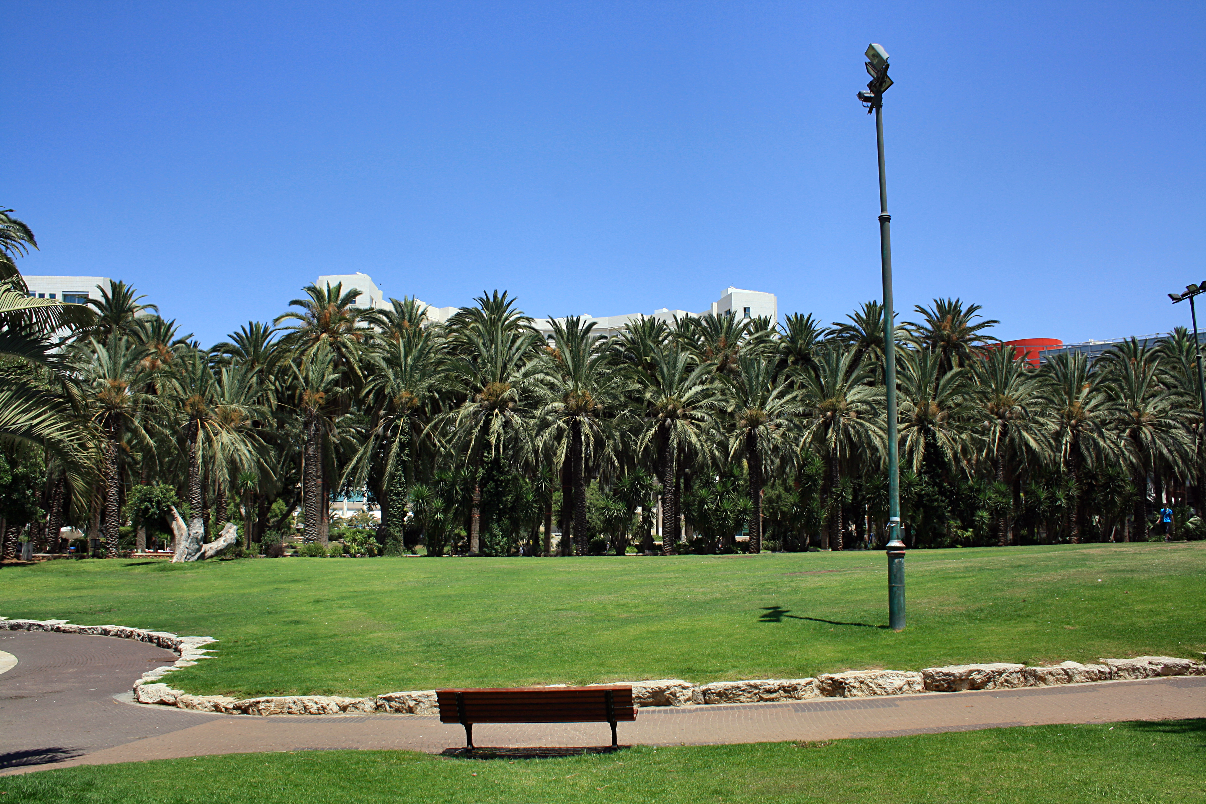 גן המושבה, ראשון לציון